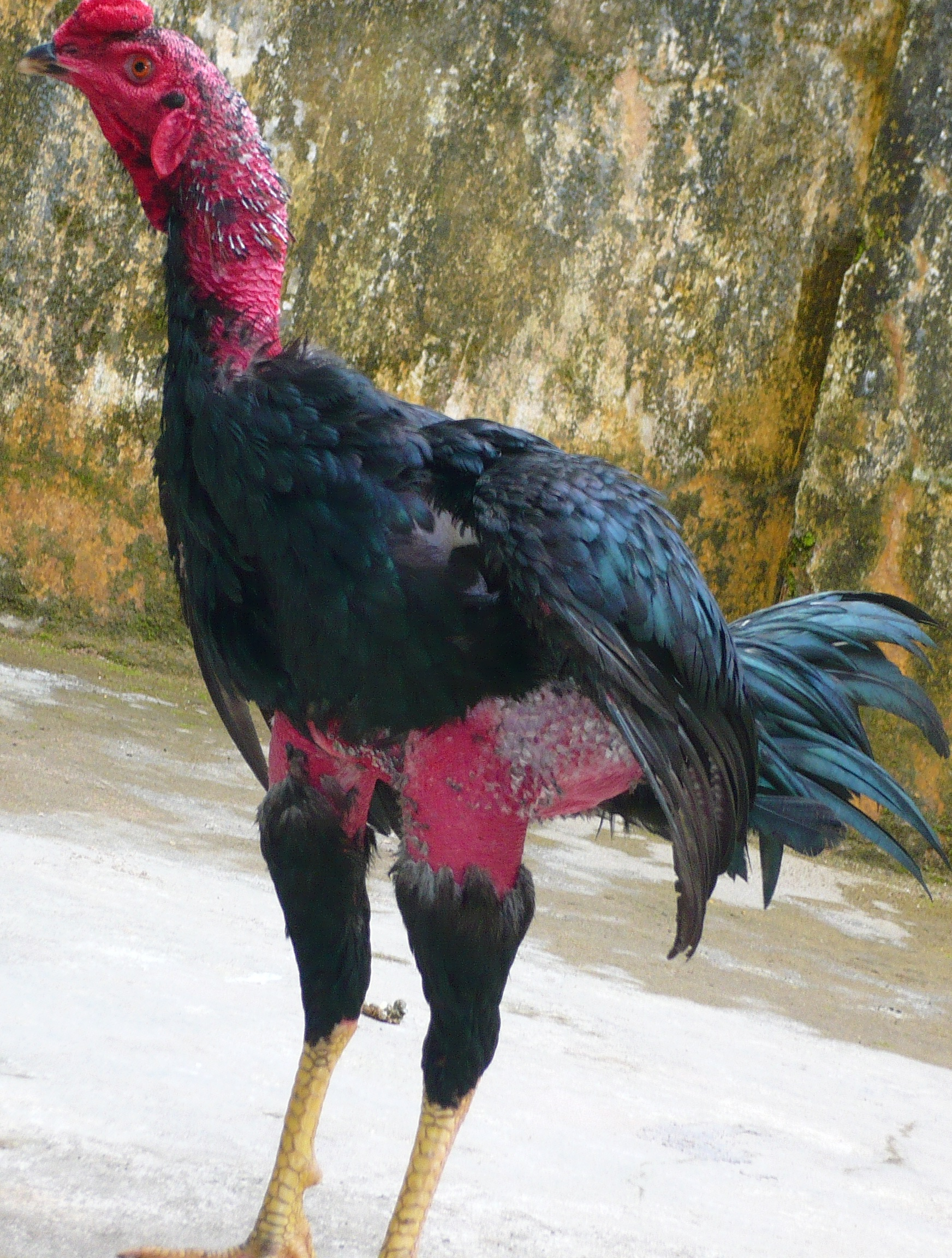 Tải lại hình gà chọi (cắt phần ngoại cảnh)